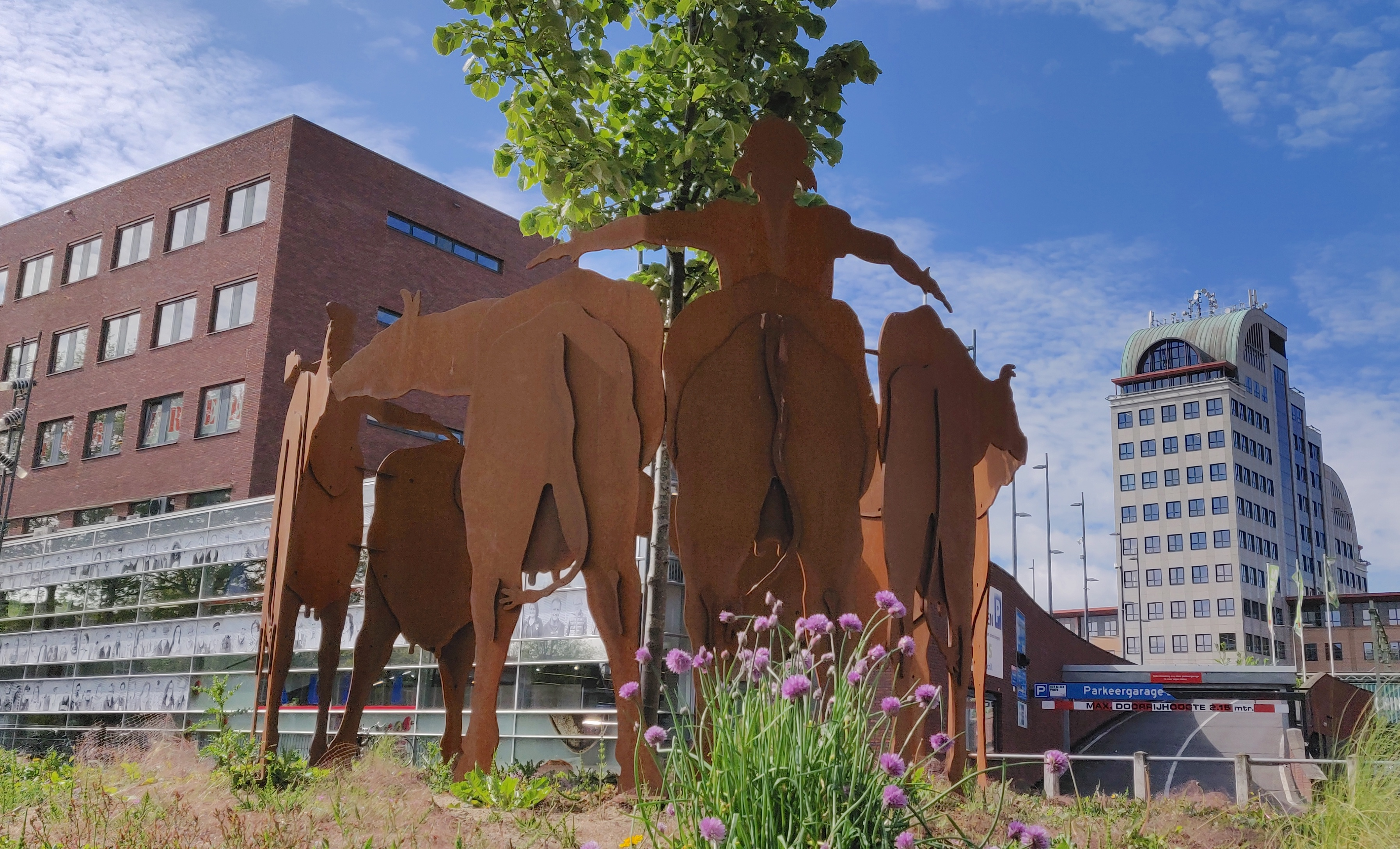 Een boerenpaar met koeien, kunstwerk in Cortenstaal op de Beestenmarkt te Deventer. Ontwerp: Willem Oosterwijk